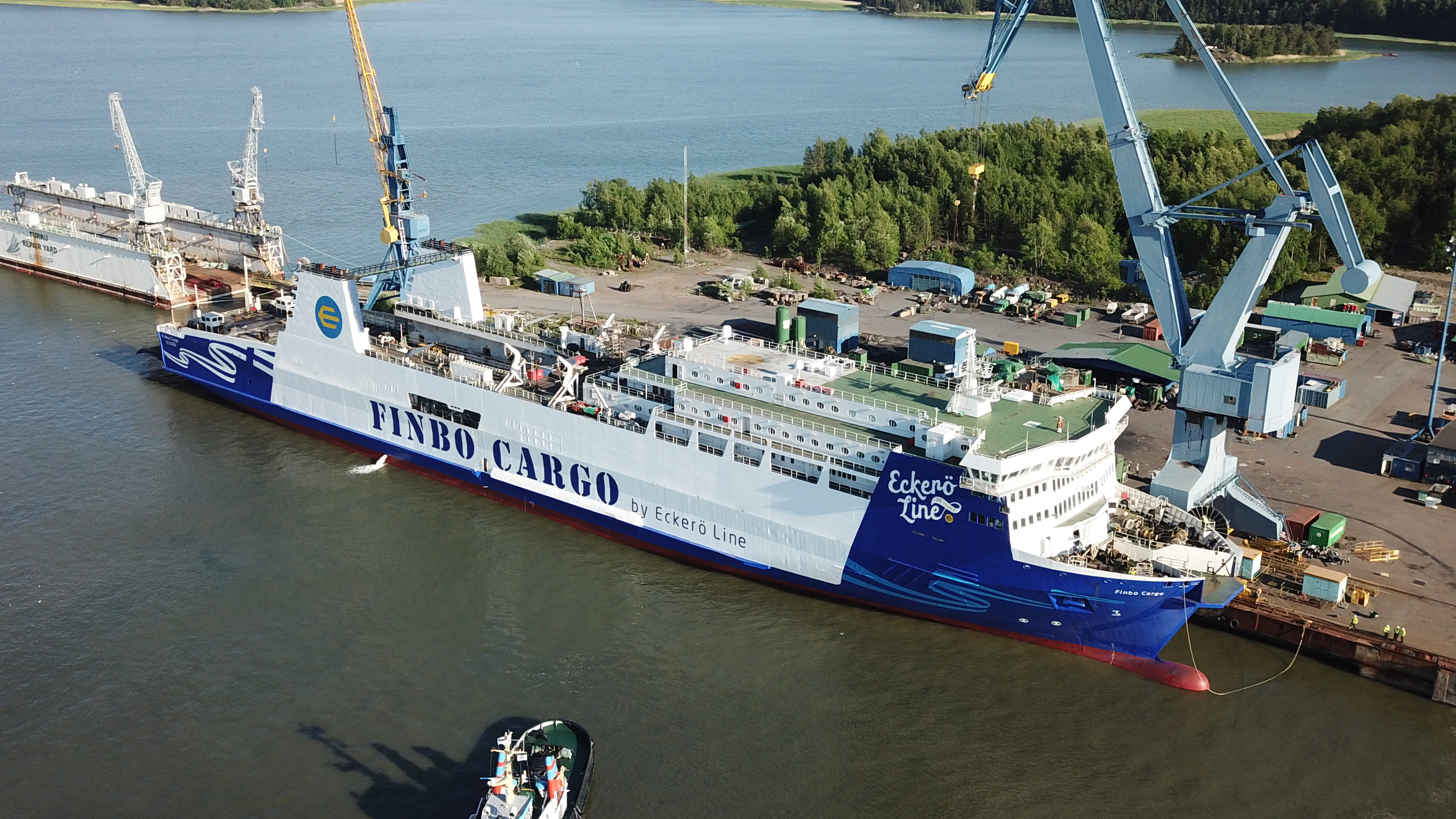 Eckerö Line Finbo Cargo rahtialus